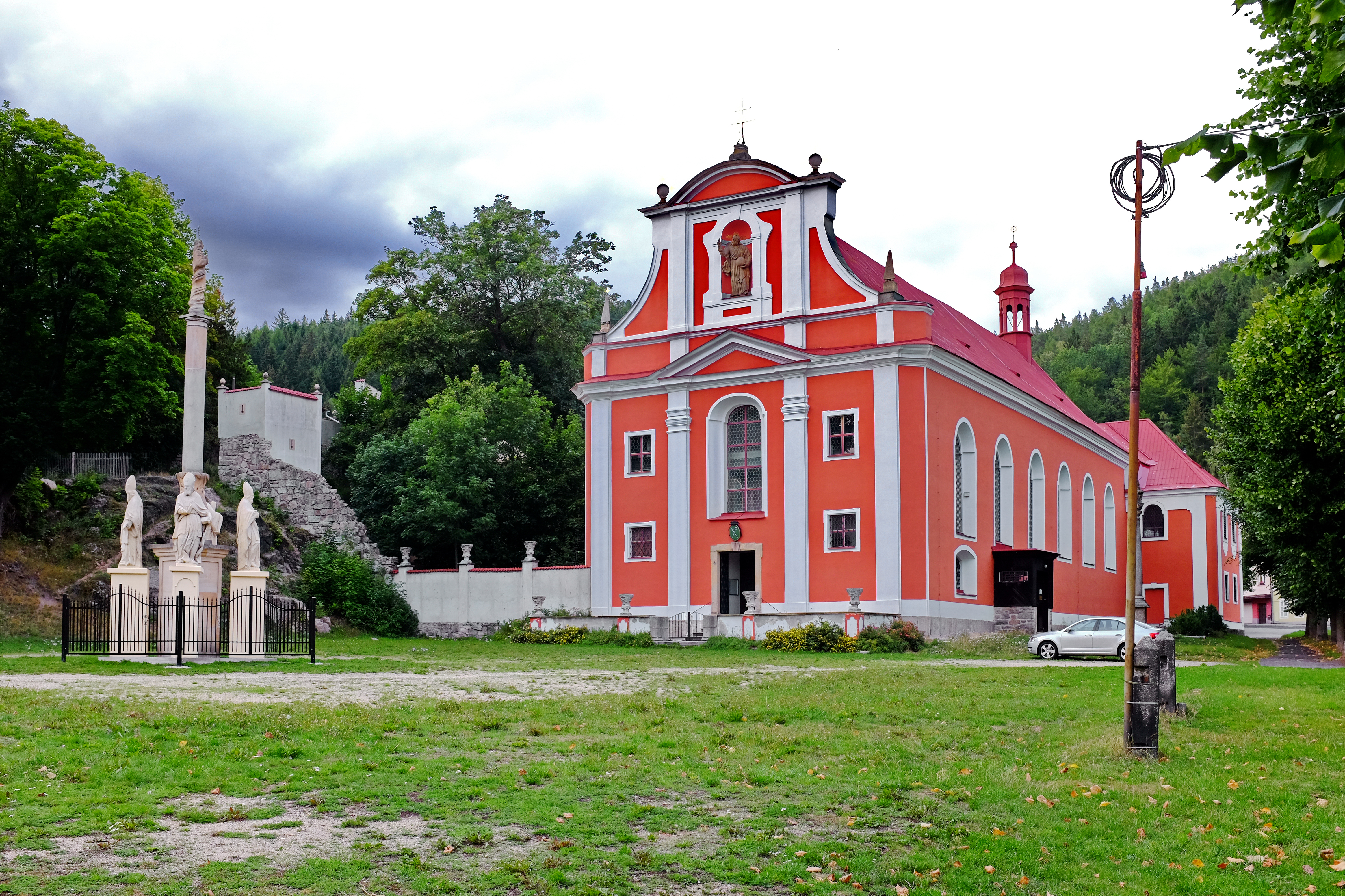 Kostel svatého Martina, Nejdek.